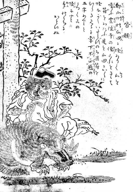 Kutsutsura (沓頬) from the Gazu Hyakki Tsurezure Bukuro (百器徒然袋)